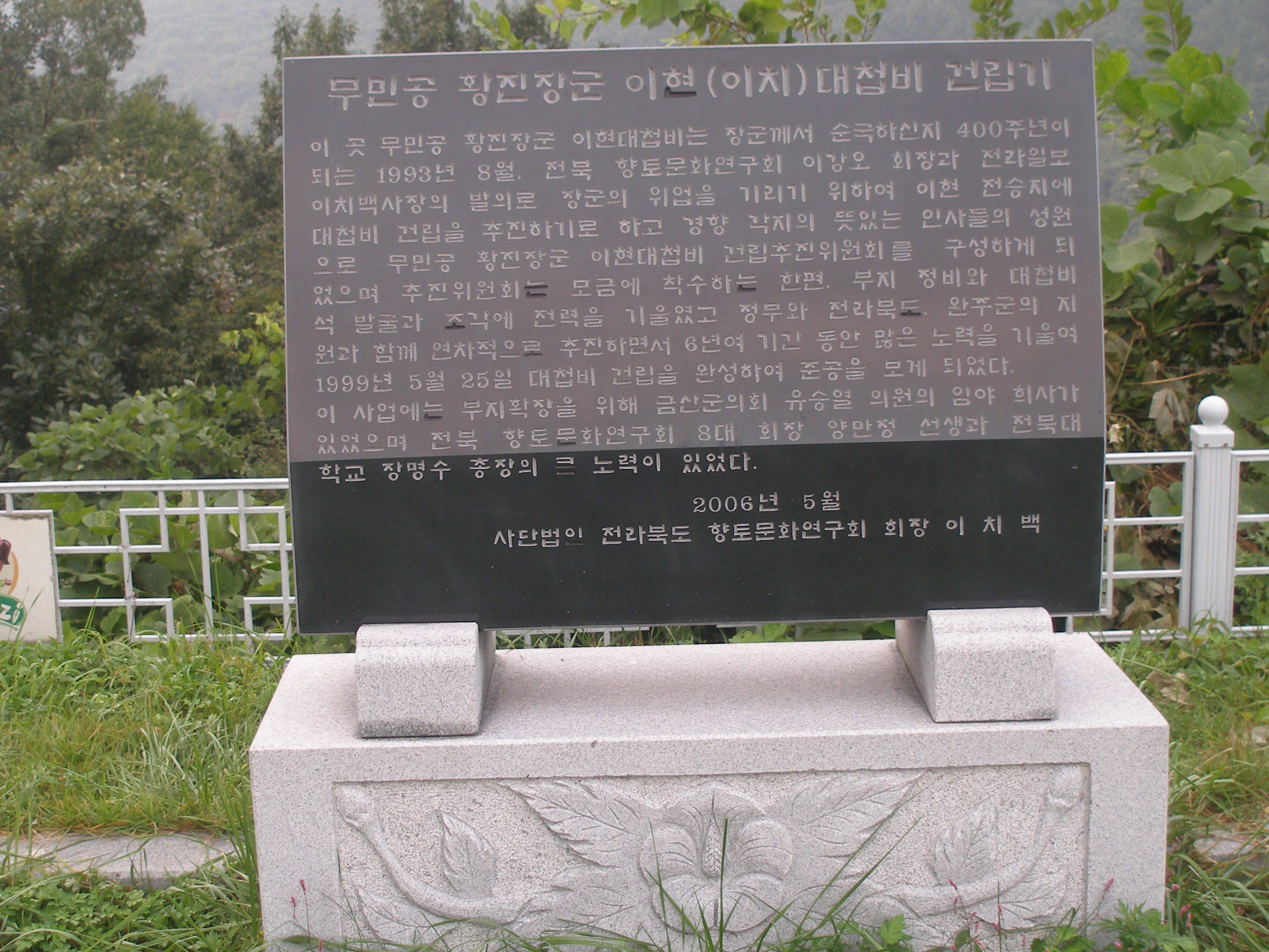 ichi battle memorial stone